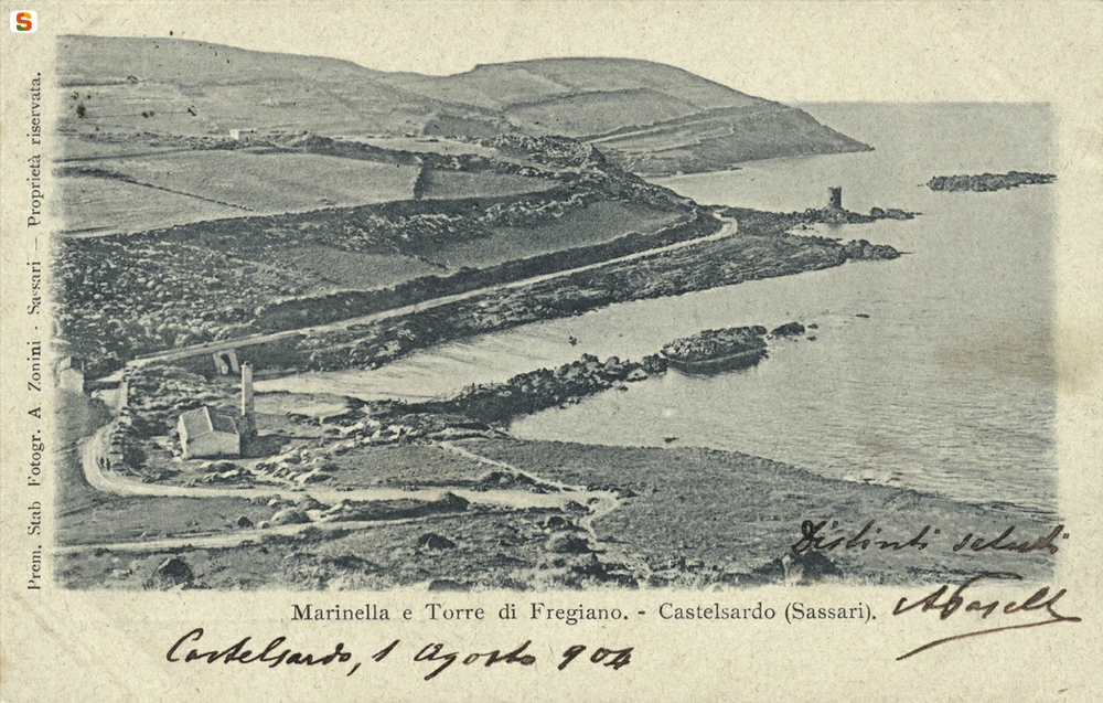 Castelsardo (Sassari), golfo di Marinella e torre di Frigiano in una fotografia antecedente al 1905